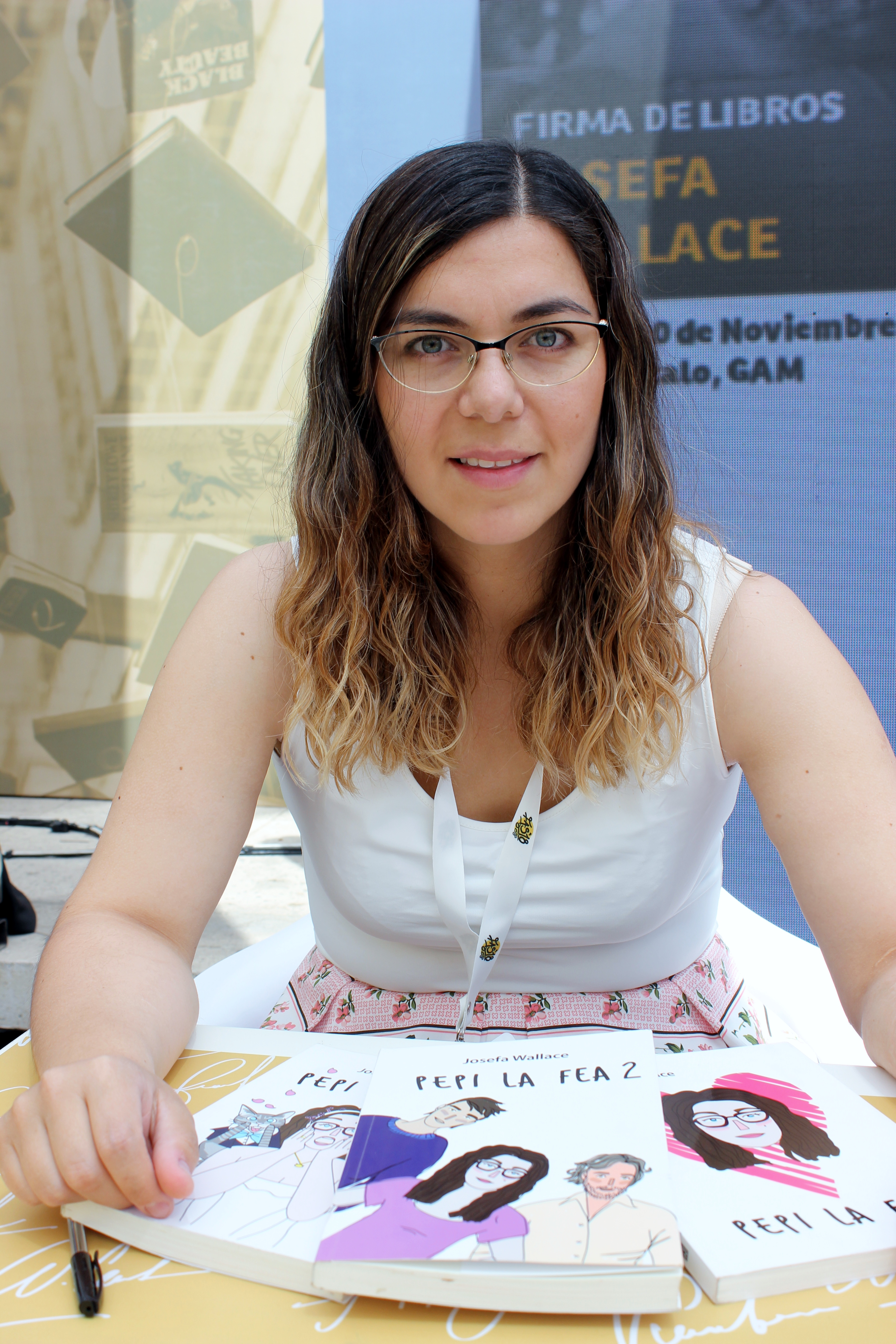 La escritora chilena Josefa Wallace durante una sesión de firma de libros en la segunda etapa del Festival de Autores de Santiago 2018 realizada en el GAM.